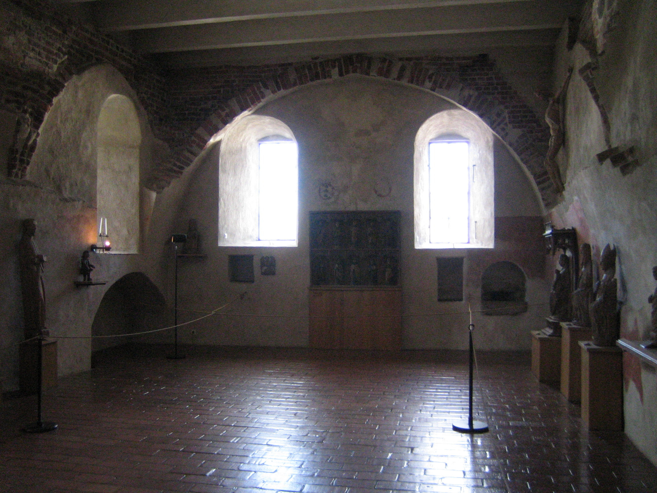 Sturen kirkko Turun linnassa